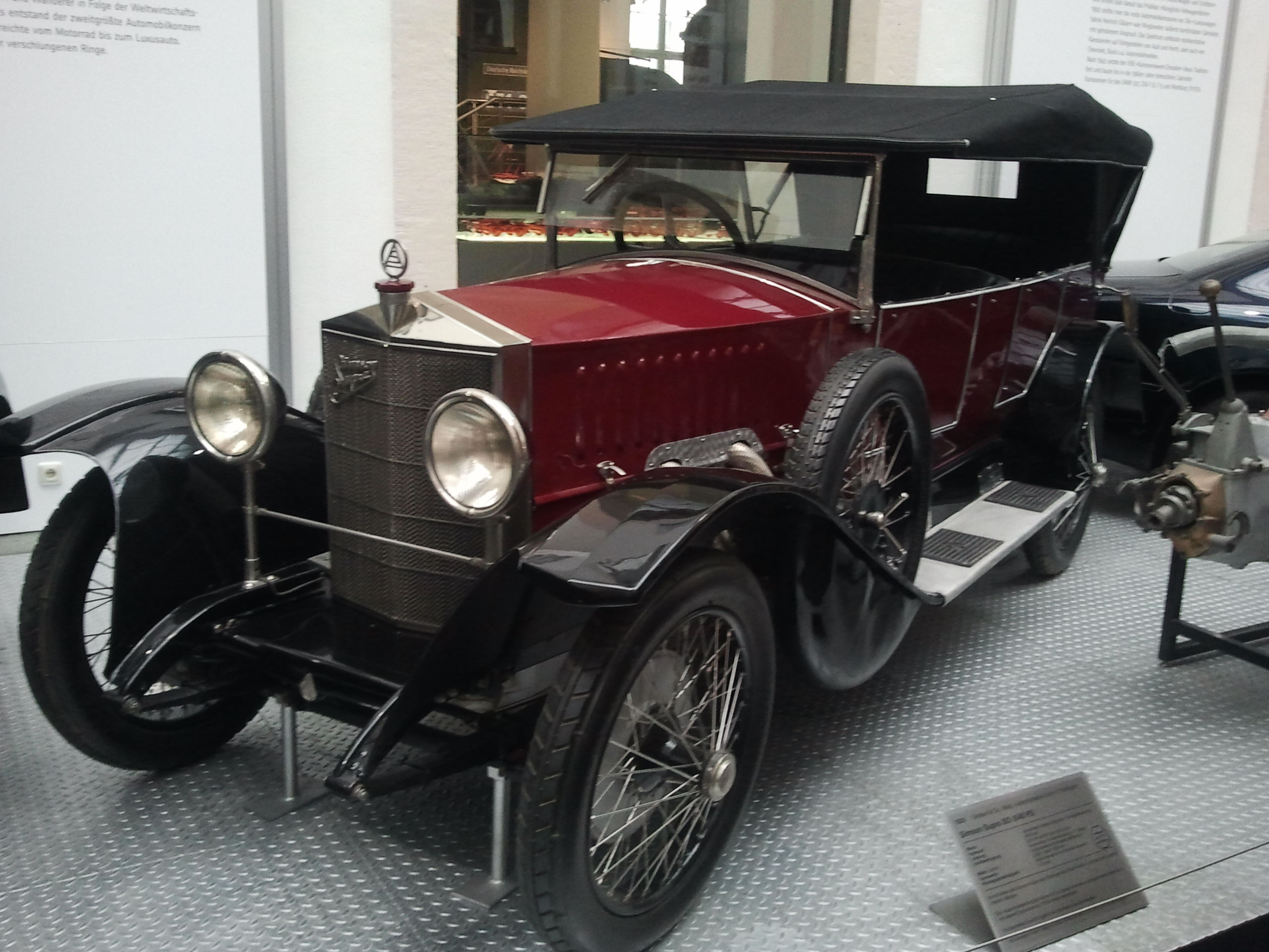 Verkehrsmuseum Dresden